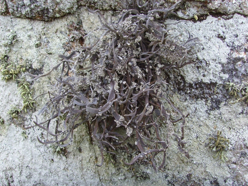 Roccella fuciformis" (Cap Sizun, Finistère, France)